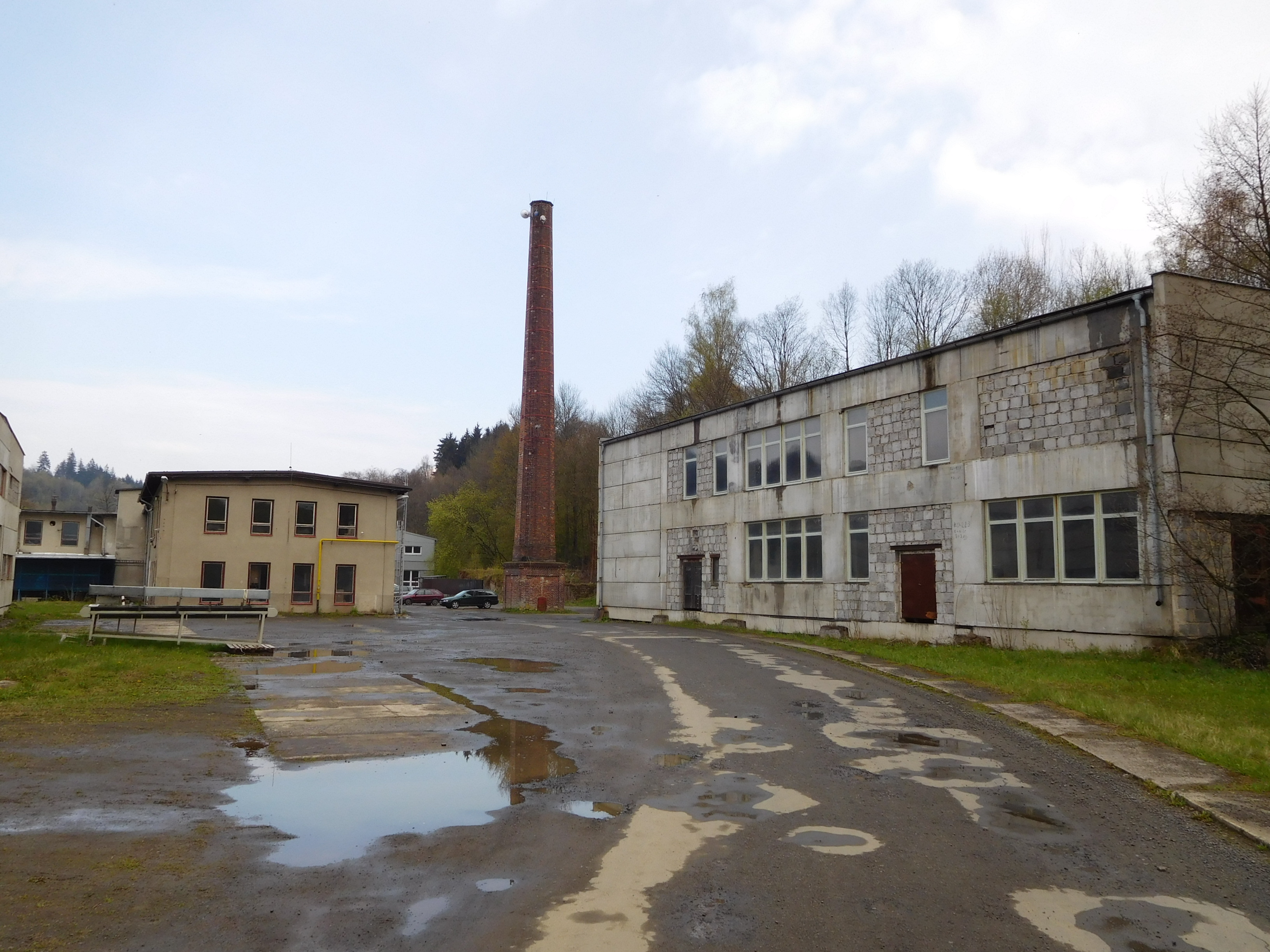 Sutice - továrna Beneš a Lát